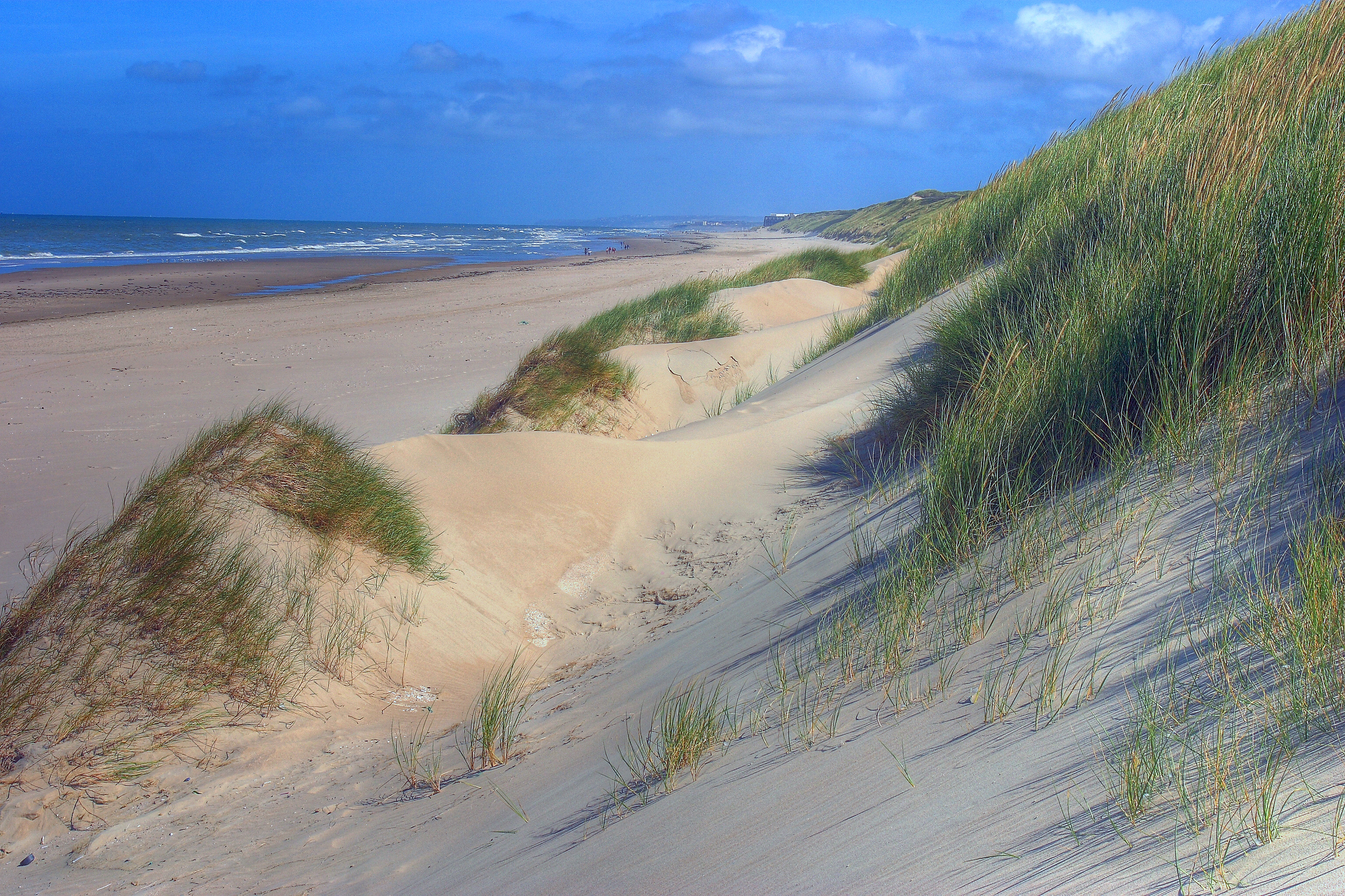 Les dunes au sud du Touquet